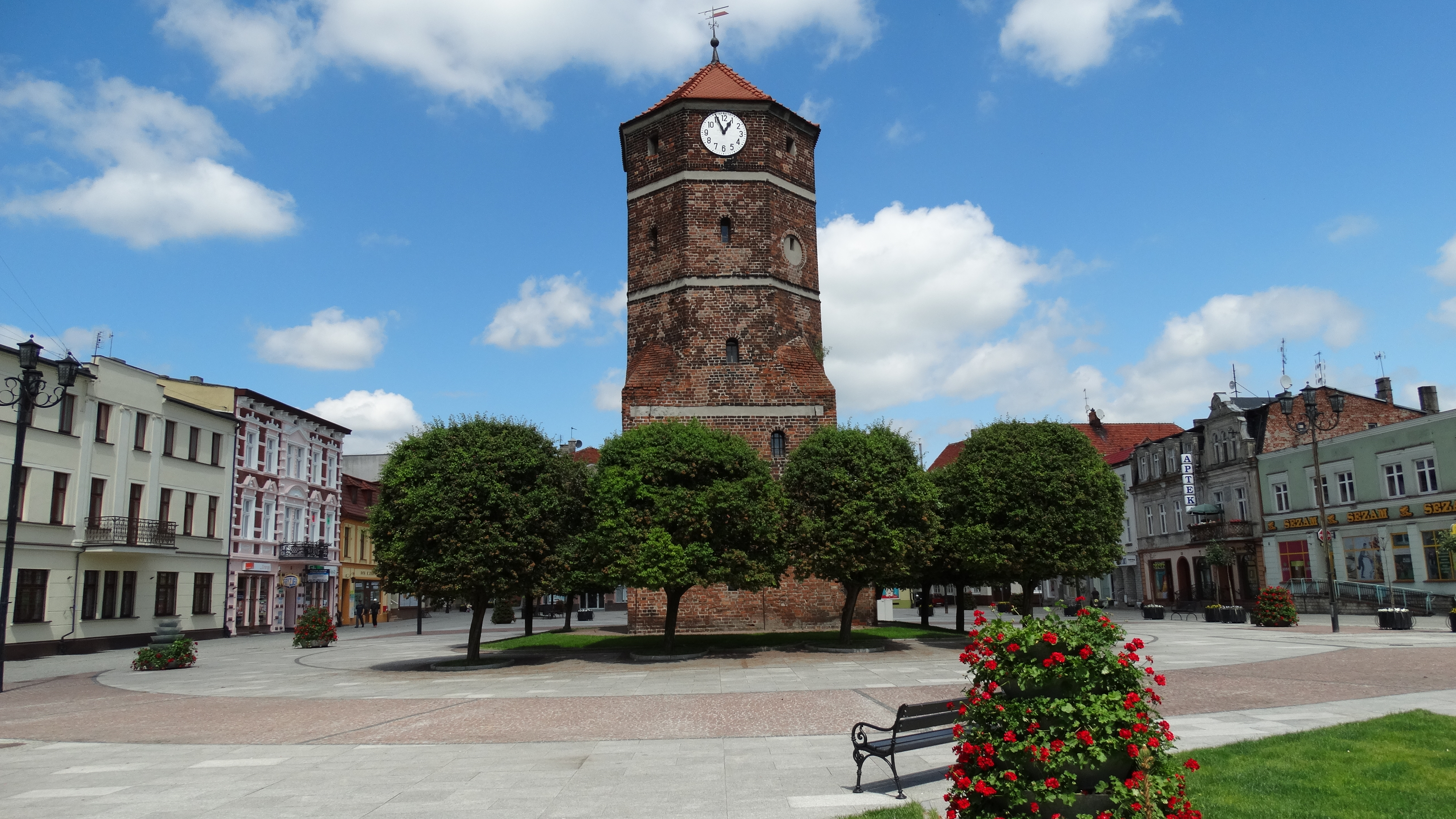 Żnin, wieża ratusza, poł. XV